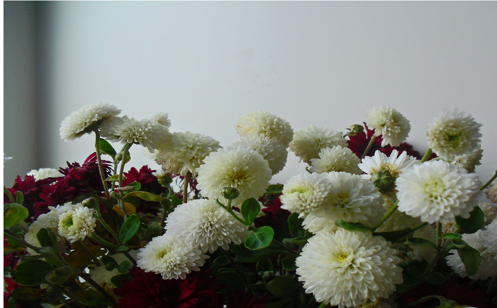 Цветы букет в формате JPG .